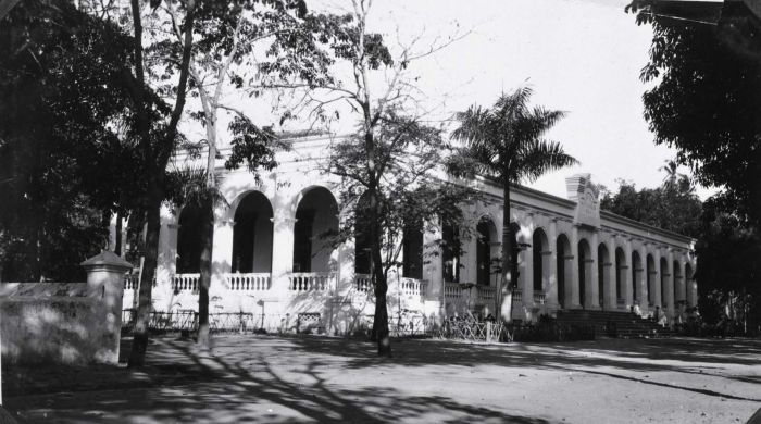 Schulgebäude in Dili, Portugiesisch-Timor